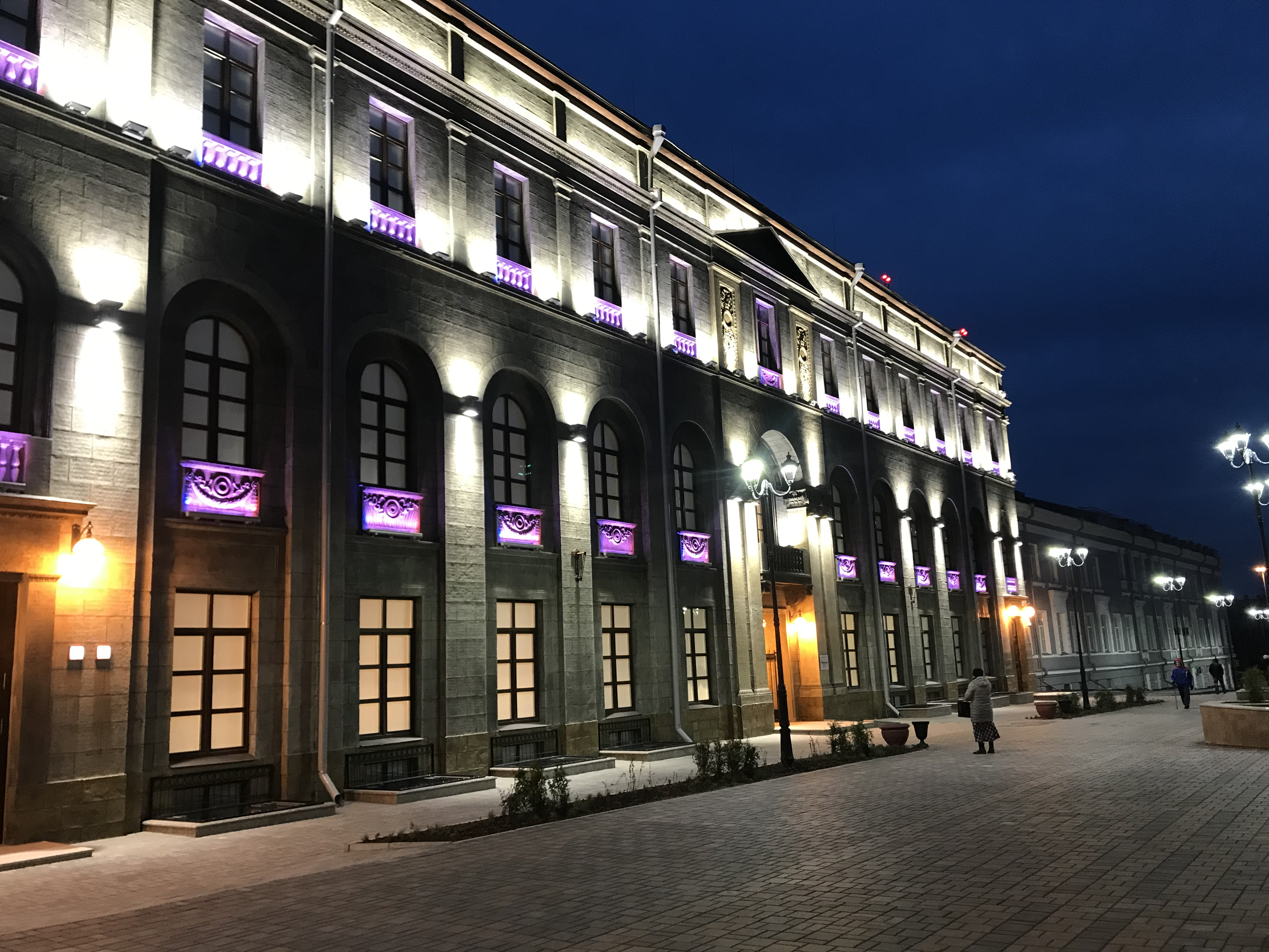 Центр "Эрмитаж-Сибирь" в Омске